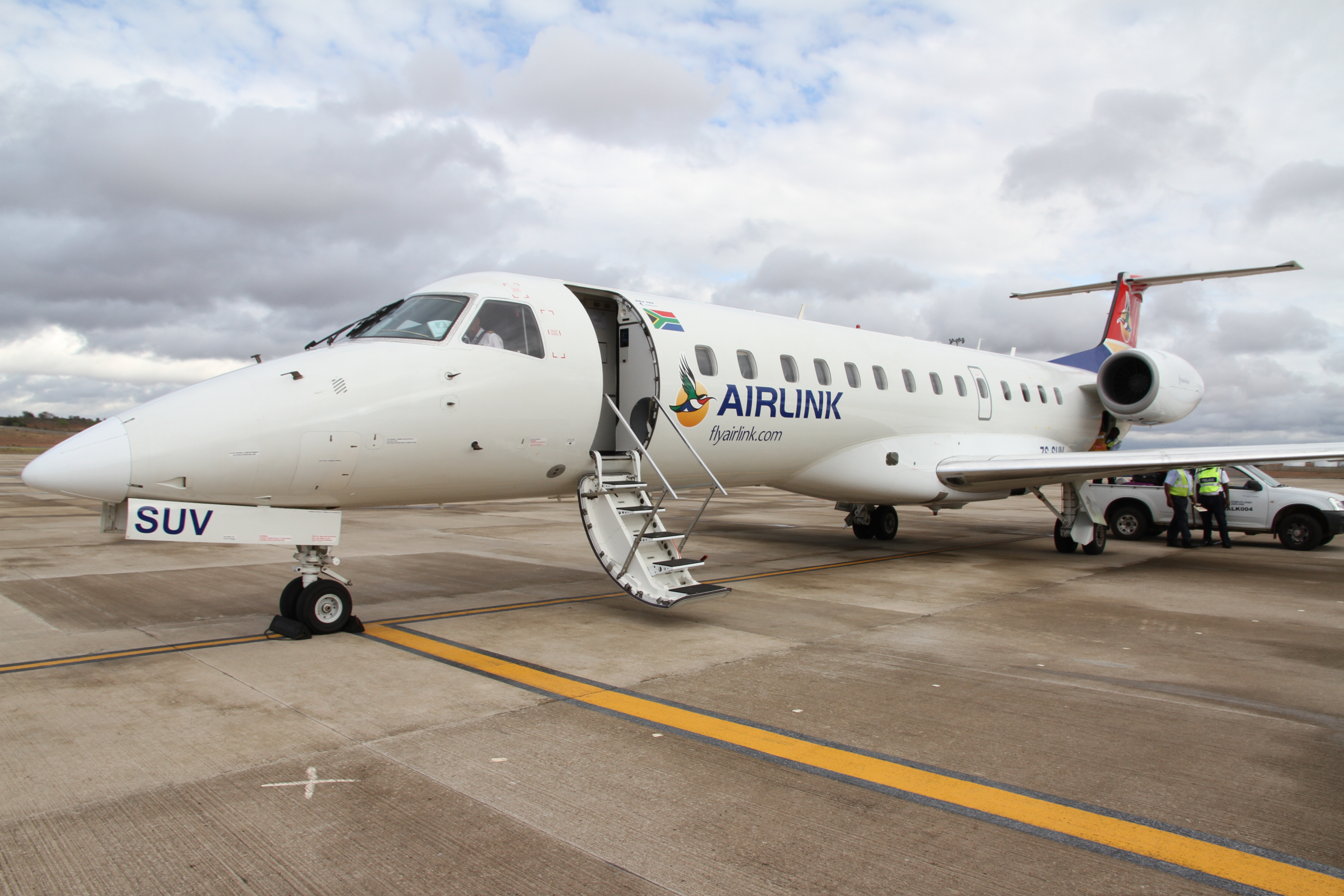 King Mswati III International Airport - Plane Airlink